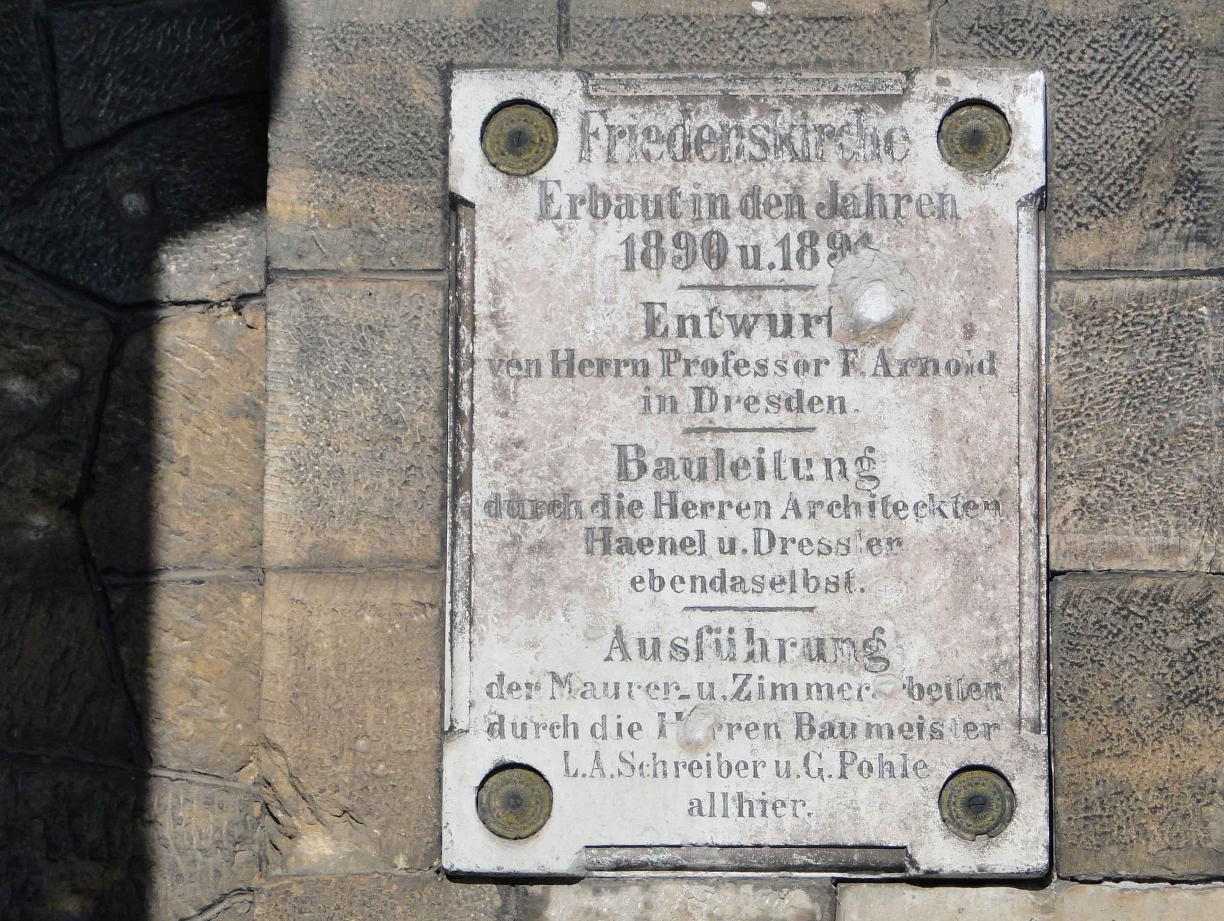 Erinnerungstafel an der Friedenskirche Löbtau. Die Inschrift lauteet: Friedenskirche Erbaut in den Jahren 1890 u. 1891 — Entwurf von Herrn Professor F. Arnold in Dresden. — Bauleitung durch die Herren Architekten Haenel und Dressler ebendaselbst. — Ausführung der Maurer- u. Zimmerarbeiten durch die Herren Baumeister L. A. Schreiber u. G. Pohle allhier.